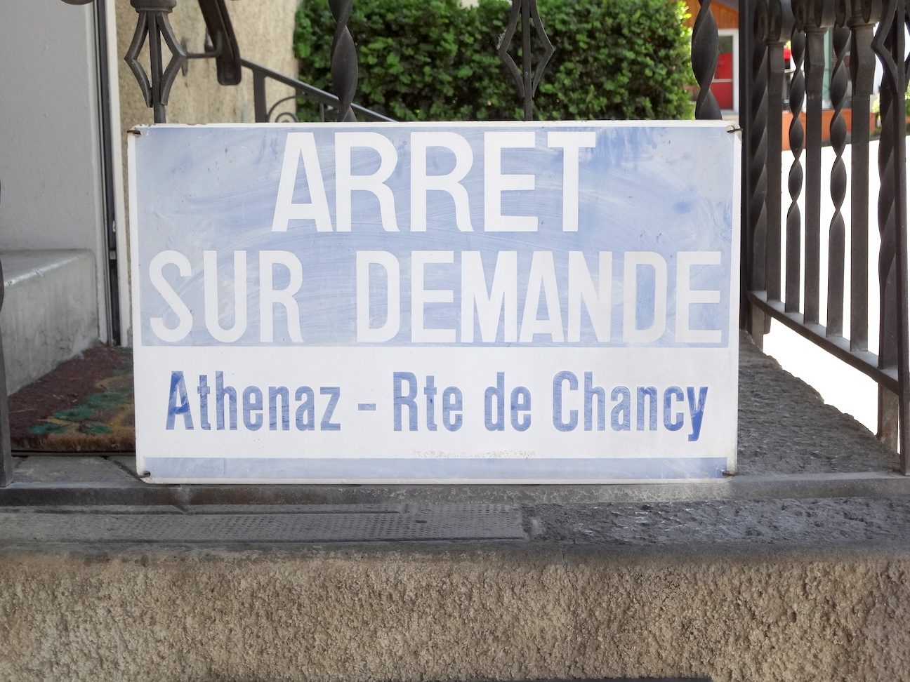 Panneau indiquant l'arrêt de bus "Athenaz - Rte de Chancy", canton de Genève. Anciennement (années 1960 ?) proche d'Athenaz, sur la route de Chancy, commune d'Avusy. Photographié devant une maison de Sézegnin, en face de l'arrêt "Le Renfort", même commune.